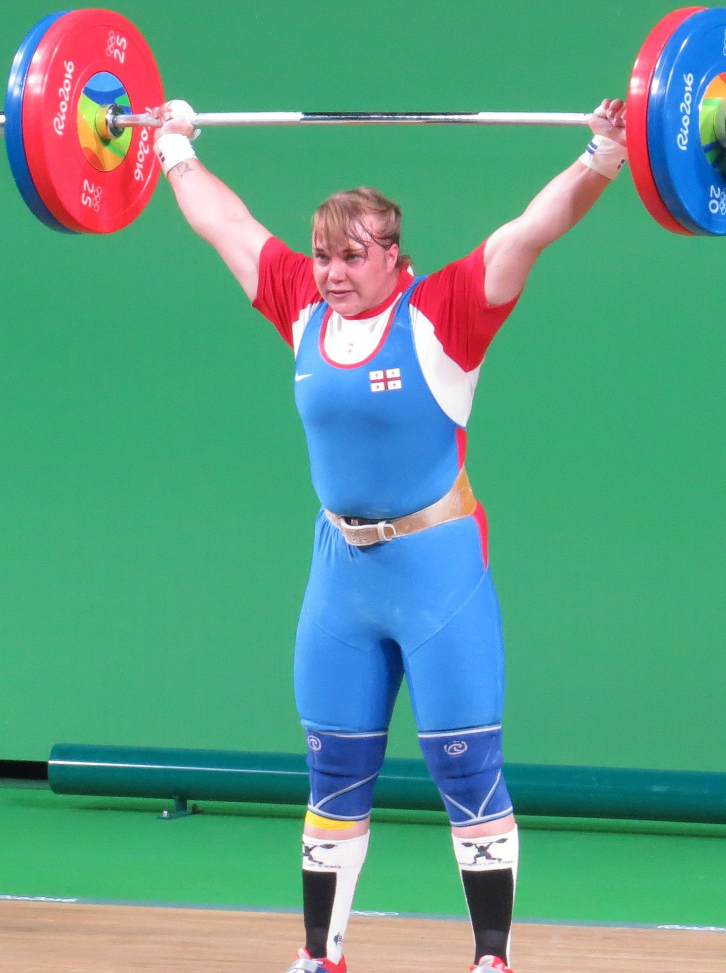 Anastasiia Hotfrid